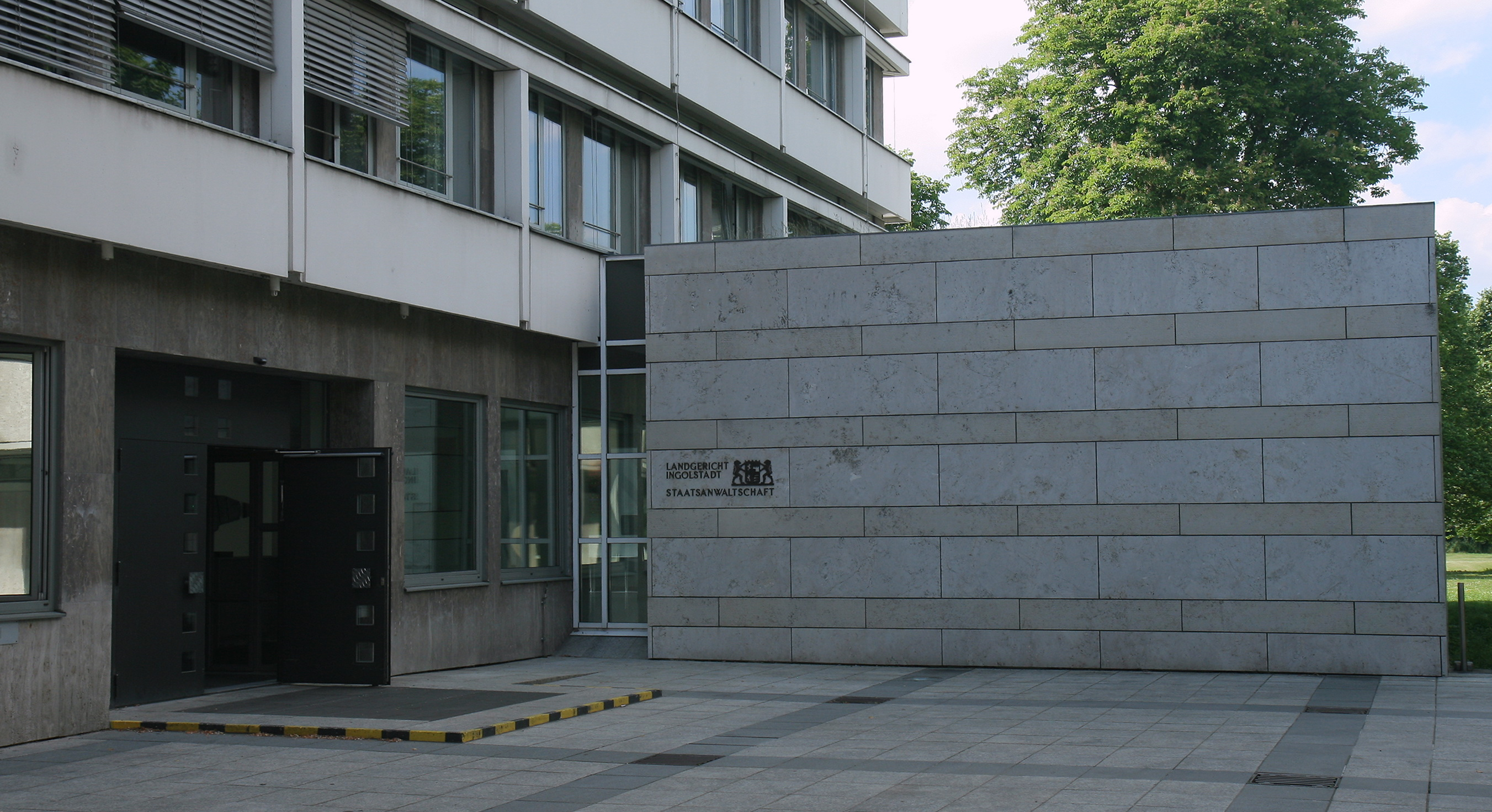 Eingangsbereich des Landgerichts und der Staatsanwaltschaft Ingolstadt, Auf der Schanz 37 in Ingolstadt.